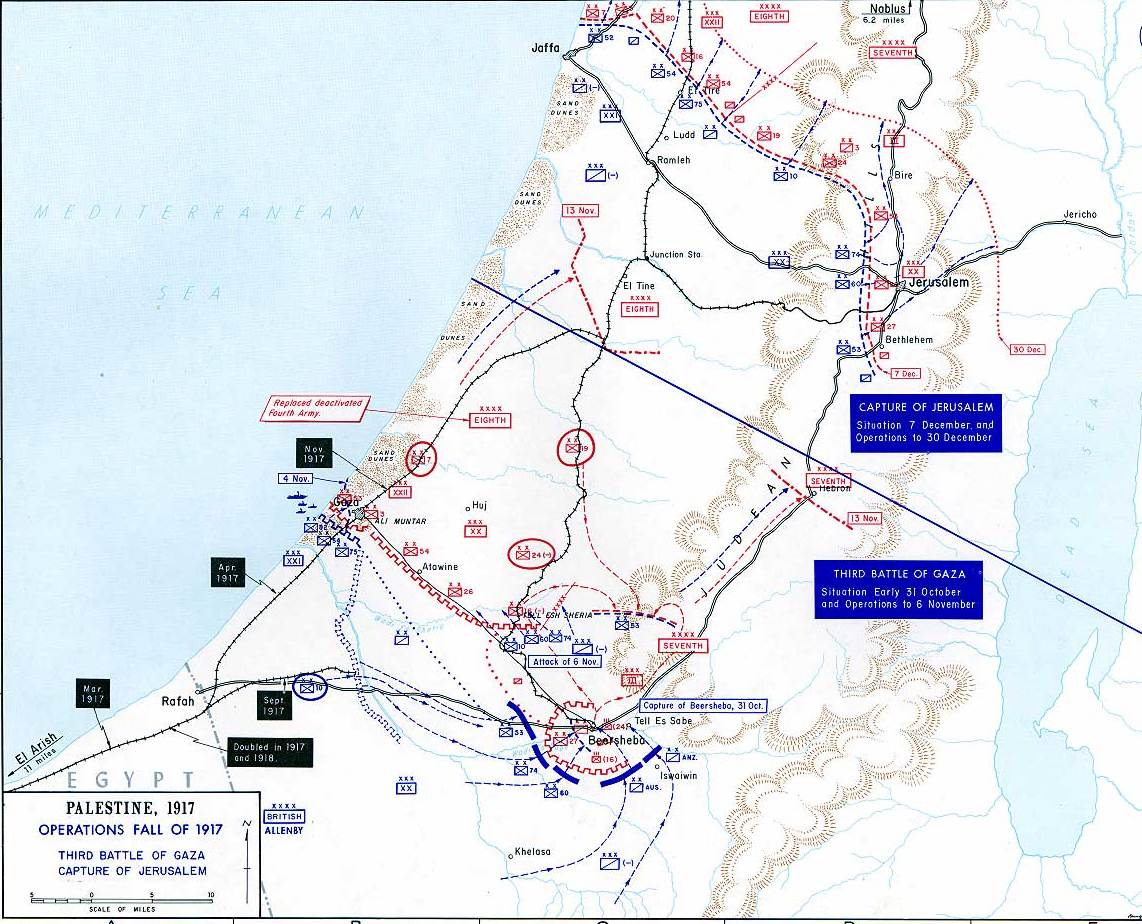 Palestine-WW1